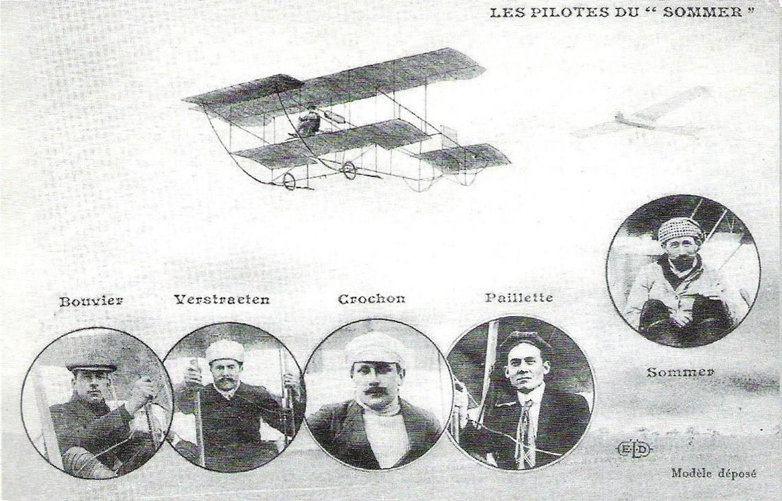 les aviateurs Roger Sommer Bouvier Verstraeten Crochon Paillette.